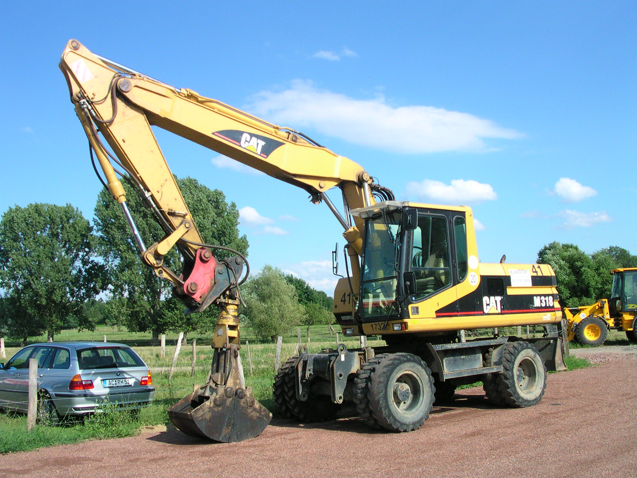 Caterpillar M 318, Baujahre 1995-2002, 17-18 t, 100 kW